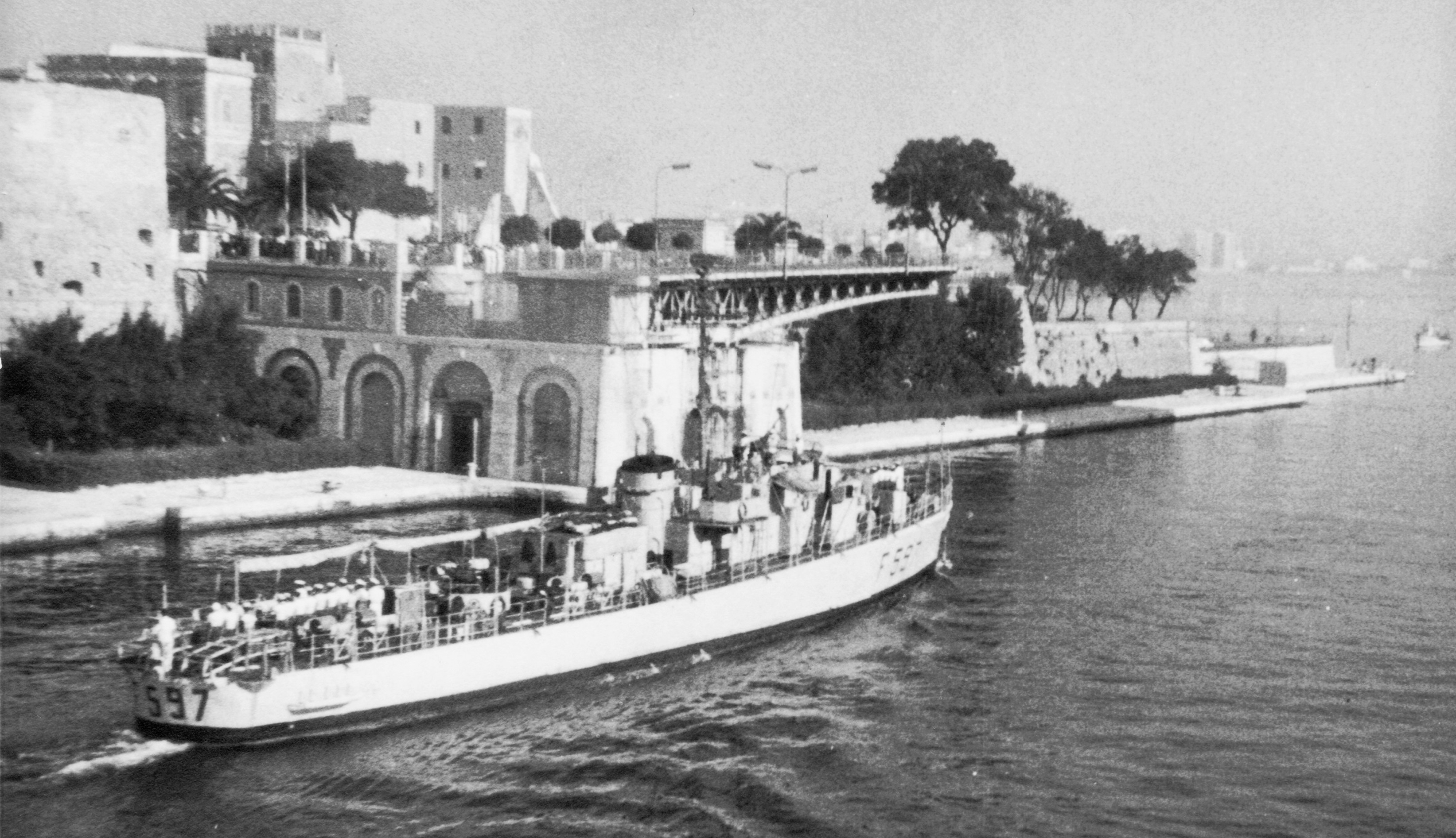 Corvetta “Vedetta” F 597 fotografata a Taranto il 30 agosto 1966